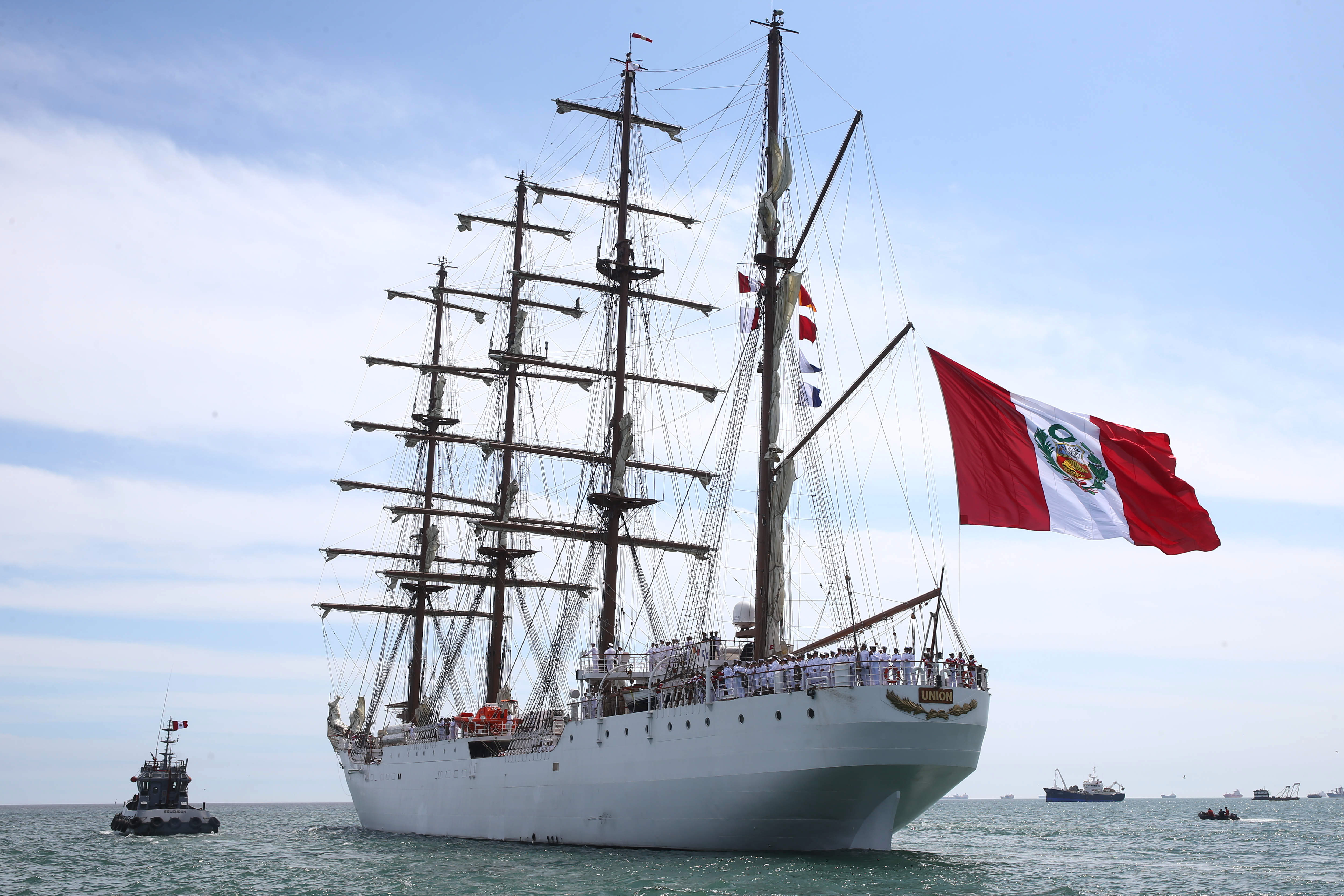 BAP Unión zarpando del Puerto del Callao durante el inicio del VIEX 2017